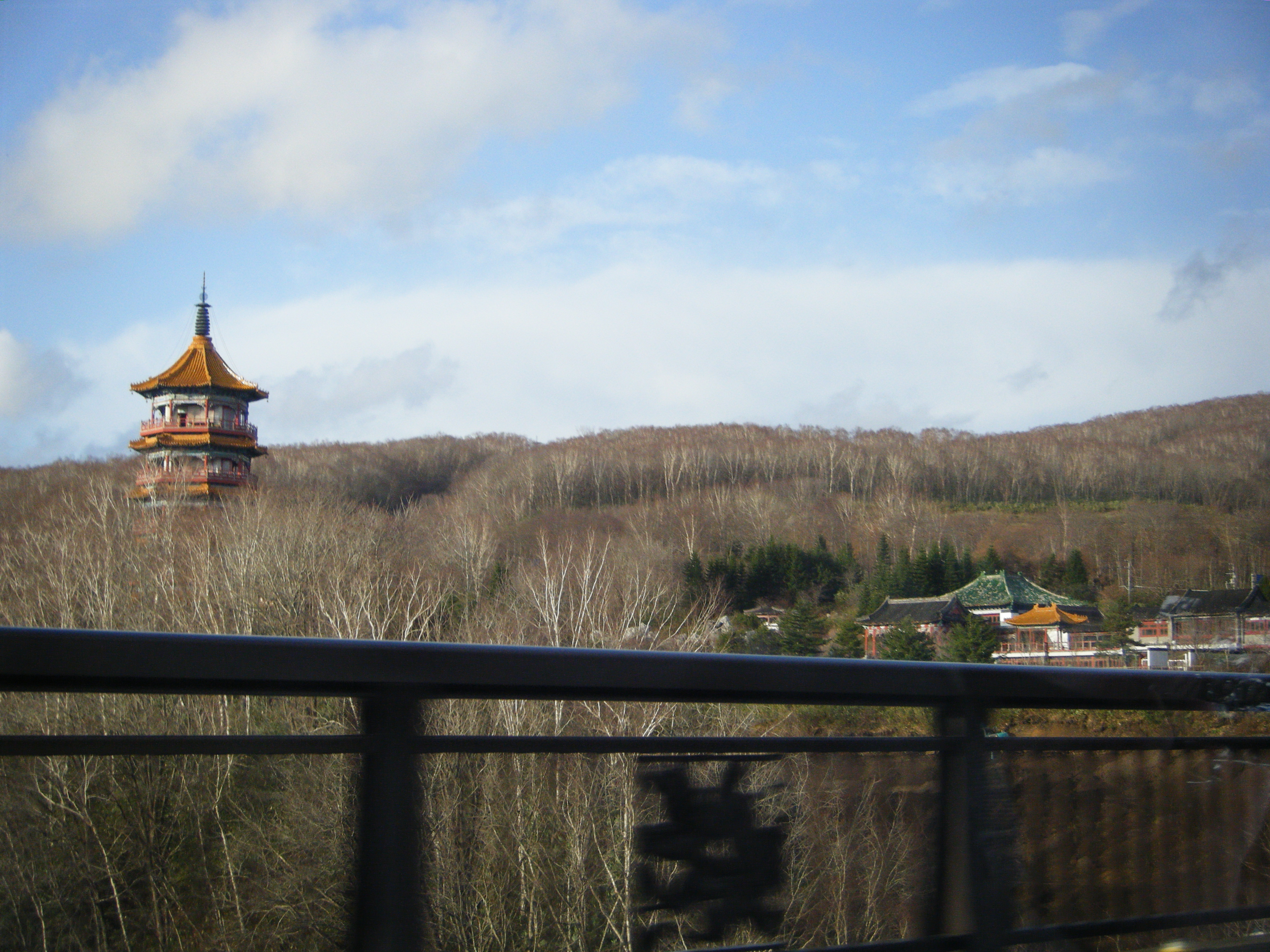 車窓から見た天華園。廃墟となっている。